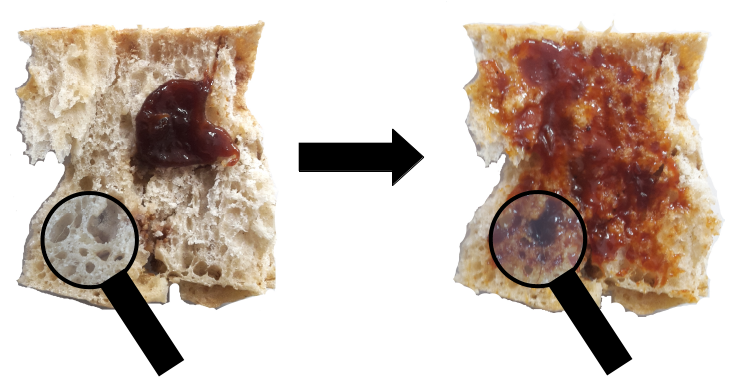 Illustration du théorème PCP (tartine de confiture)